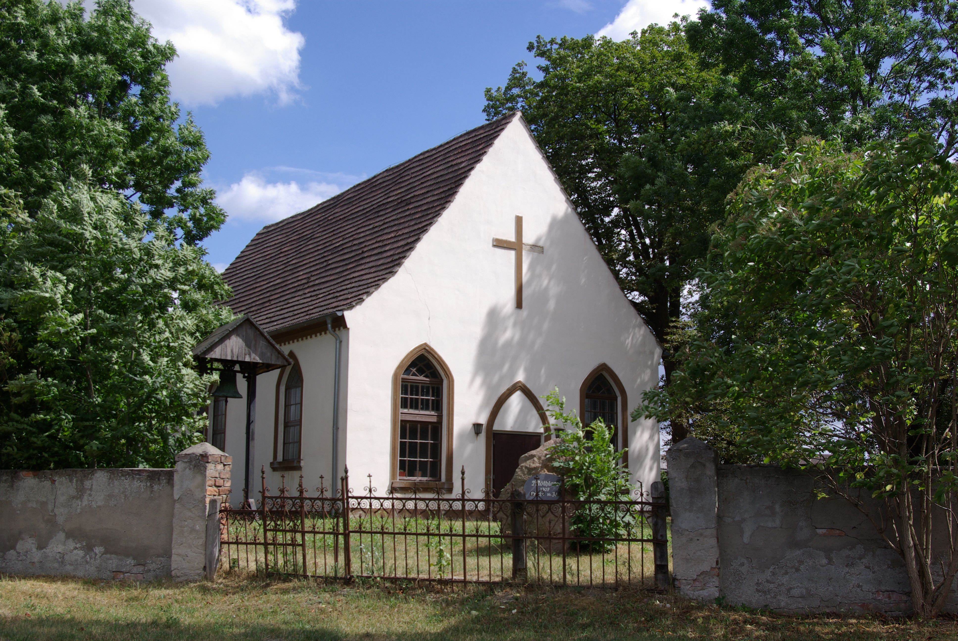 Märkisch Luch, Ortsteil Möthlow in Brandenburg. Die Kirche steht unter Denkmalschutz.